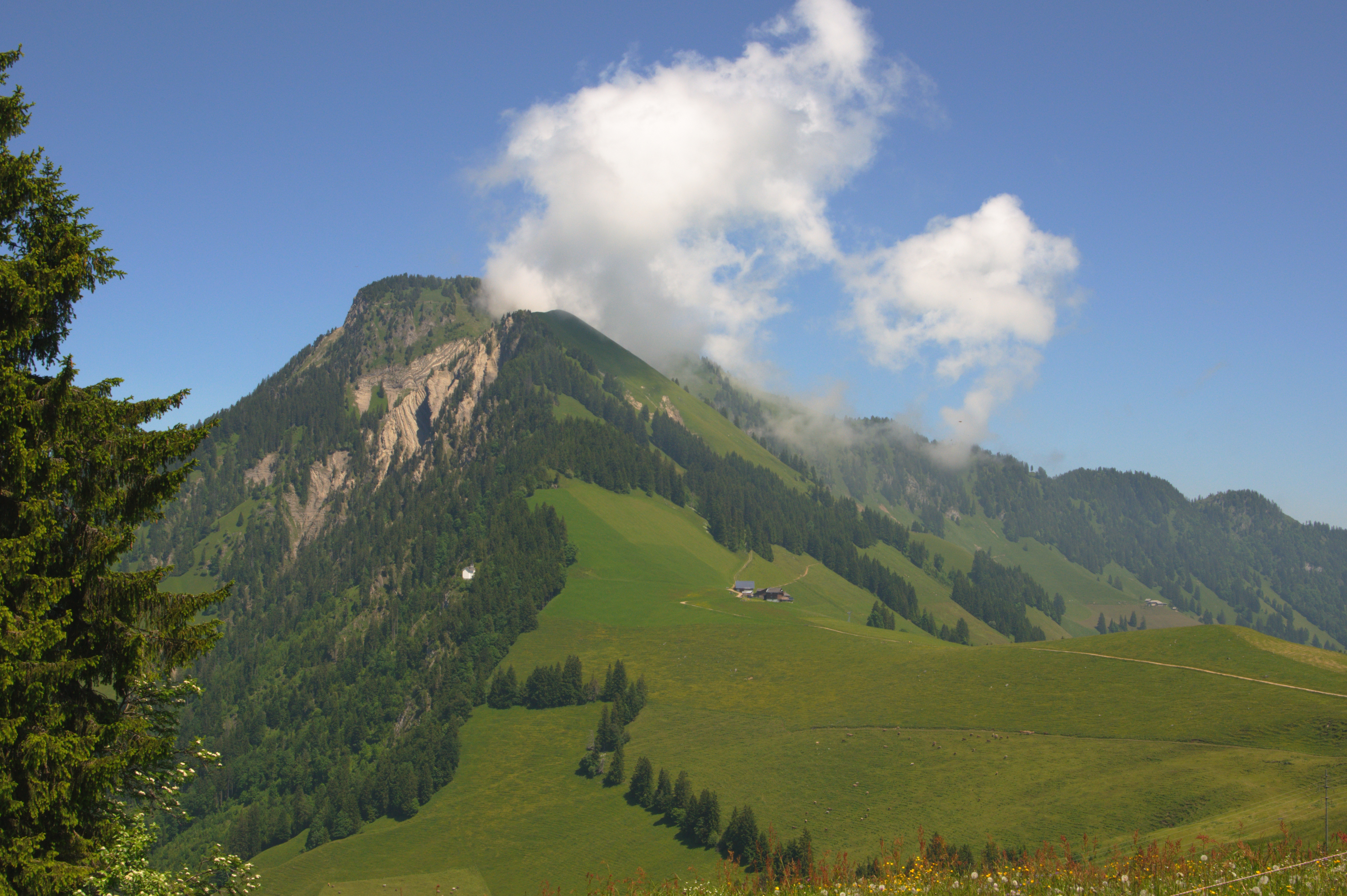 Blick vom Ächerlipass Richtung Norden zum Stanserhorn